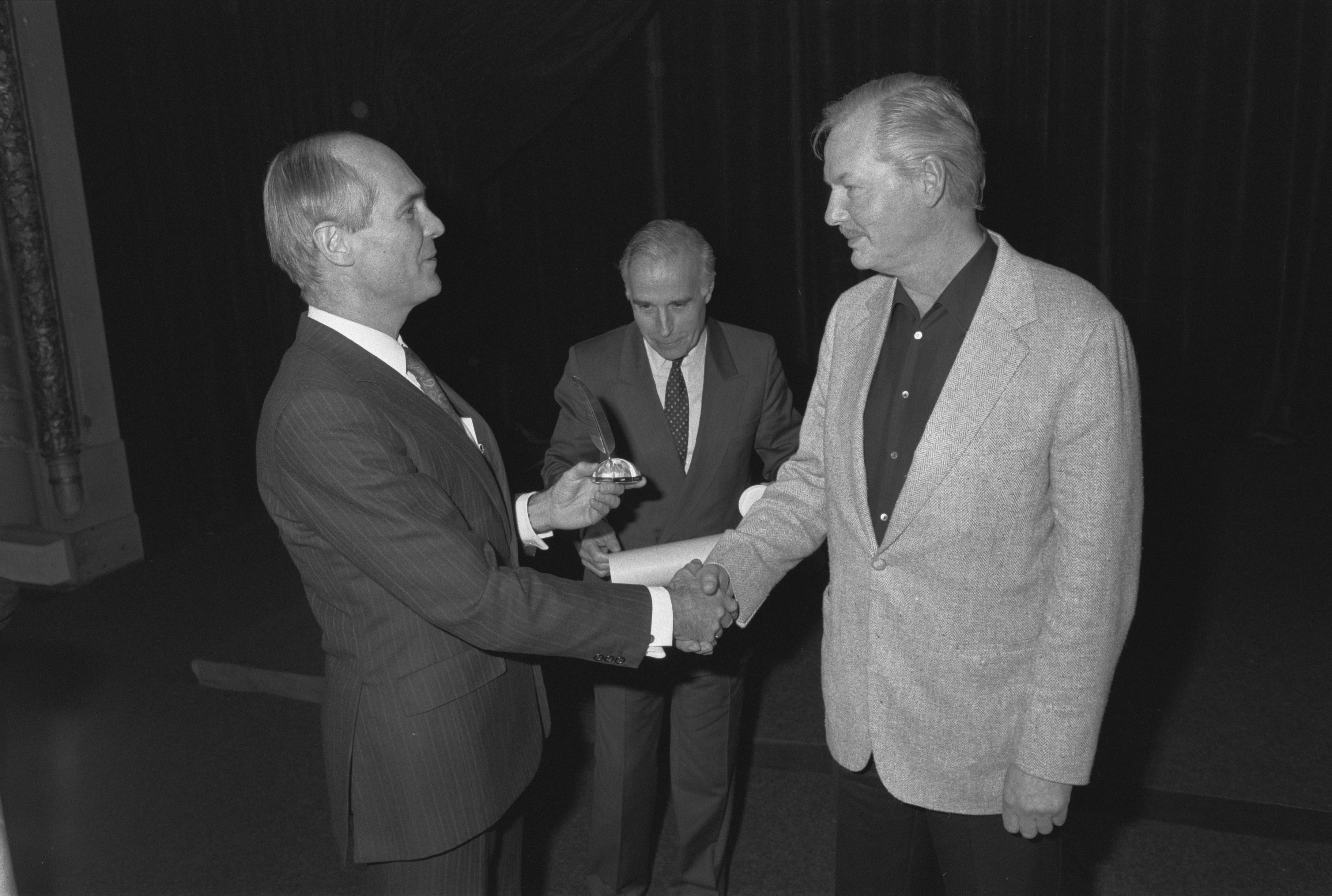 Collectie / Archief : Fotocollectie Anefo Reportage / Serie : [ onbekend ] Beschrijving : "Armando" met prijs Gouden Ganzeveer Datum : 9 december 1987 Trefwoorden : prijzen Fotograaf : Molendijk, Bart / Anefo Auteursrechthebbende : Nationaal Archief Materiaalsoort : Negatief (zwart/wit) Nummer archiefinventaris : bekijk toegang 2.24.01.05 Bestanddeelnummer : 934-1469 Reacties Geplaatst door poezie op 21 mei 2015 - 17:12. culturele prijs van de Nederlandse Uitgeversbond (KNUB) Locatie: Amsterdamse Stadsschouwburg Plaats: Amsterdam, Noord-Holland